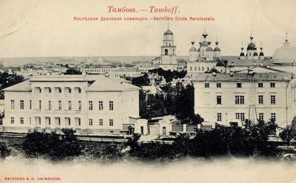 Последняя духовная семинария